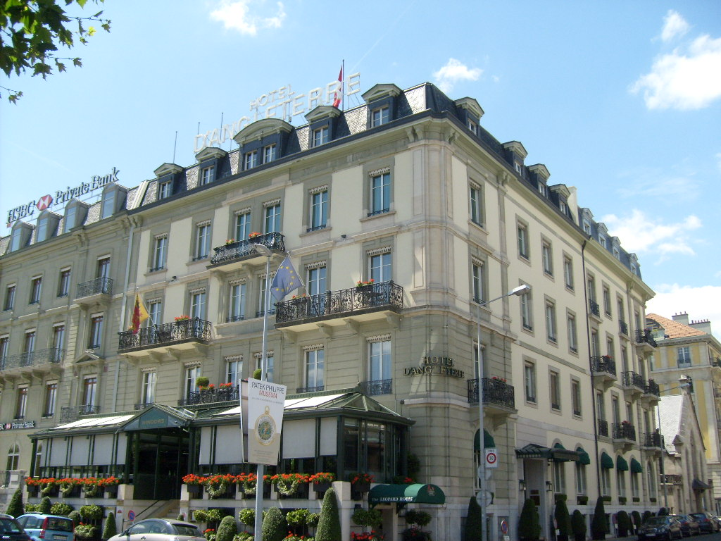 Hôtel d'Angleterre à Genève (Suisse)